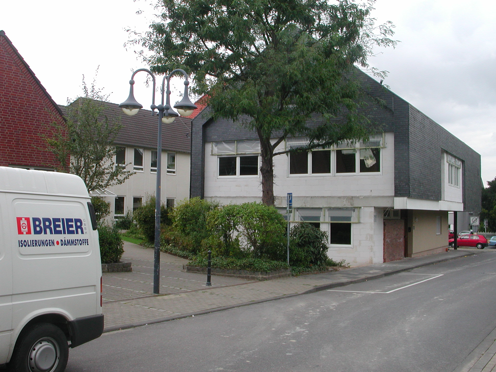 Rathaus Nörvenich mit Anbauten